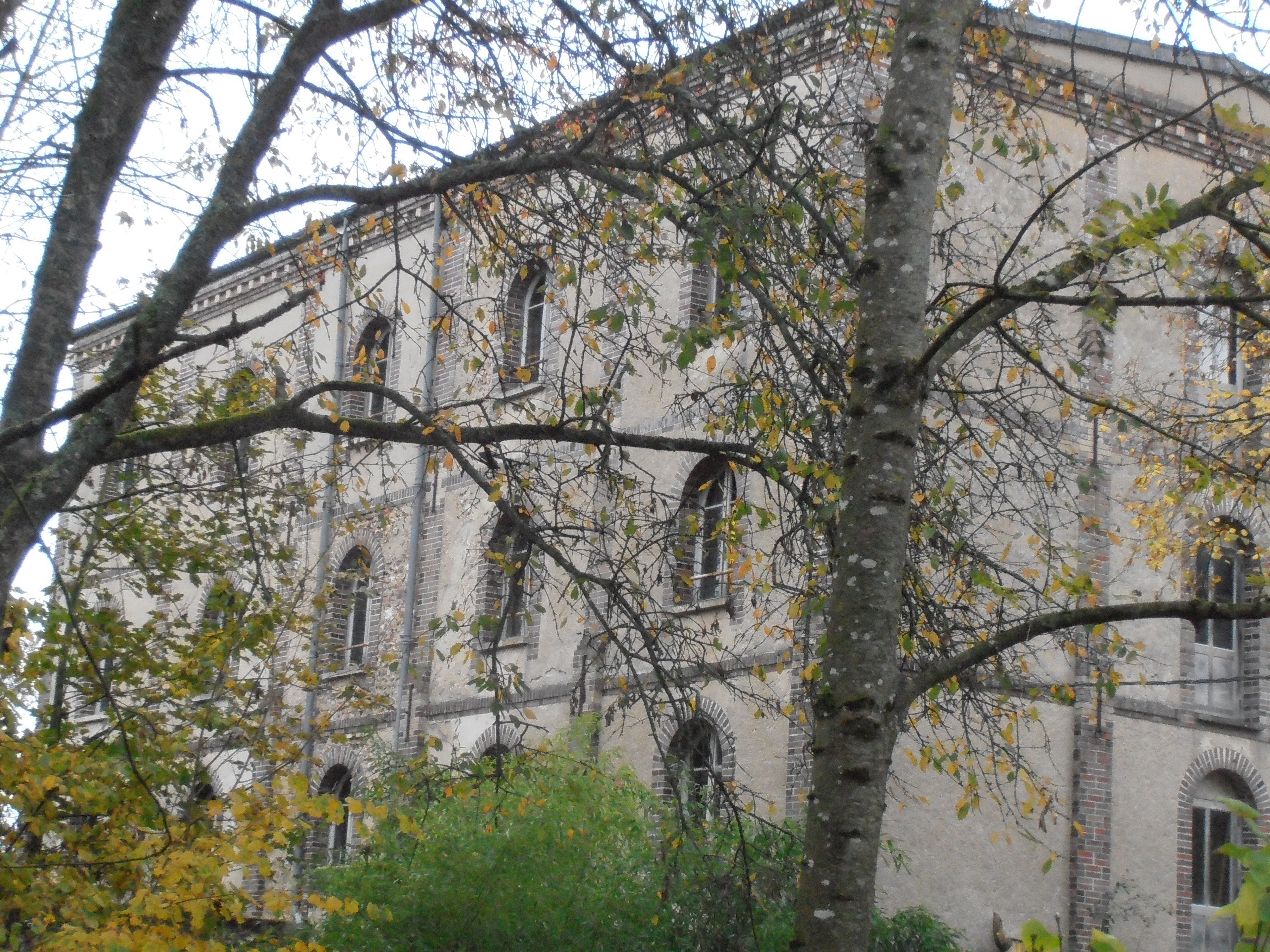 Il s'agit de la Minoterie de Gauville à Saint-julien-du-Sault (Yonne) France